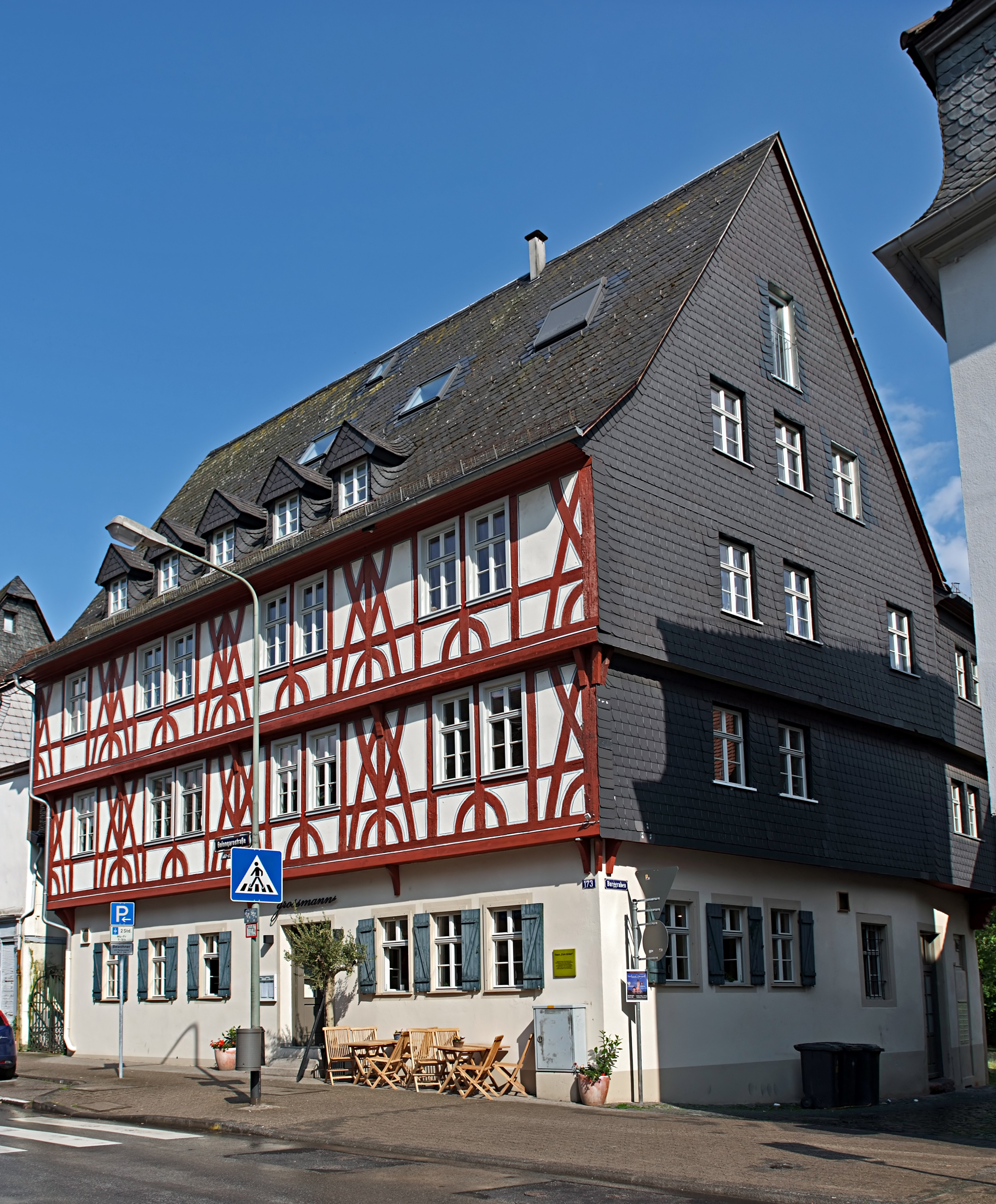 Haus zum Anker, Bolongarostraße 173, Grossmann's Restaurant